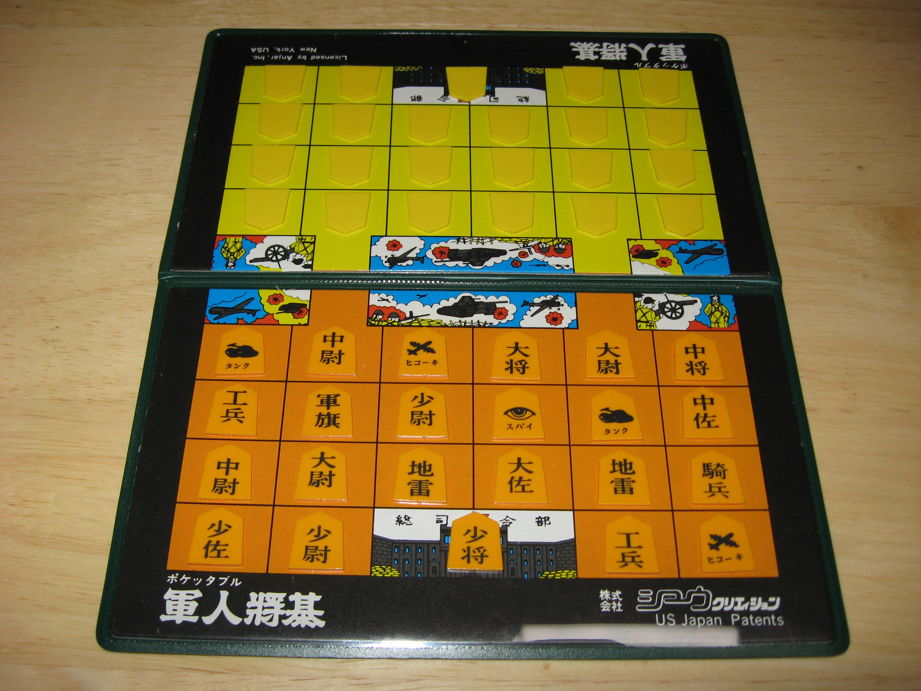 Gunjin Shogi (Wikipedia)